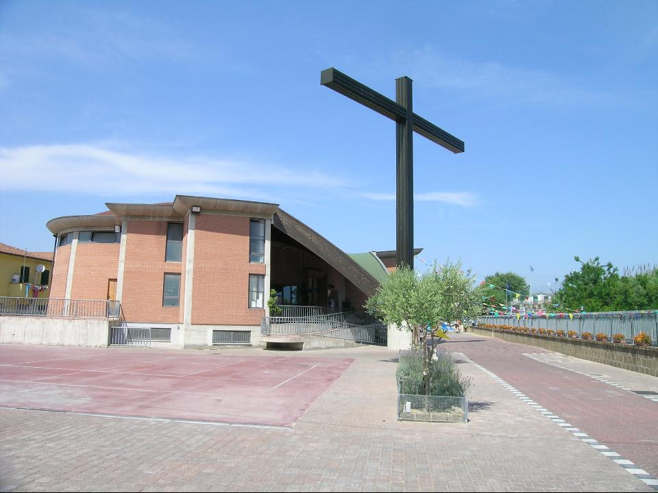 Nuova Chiesa Madonna del Fuoco di Pescara